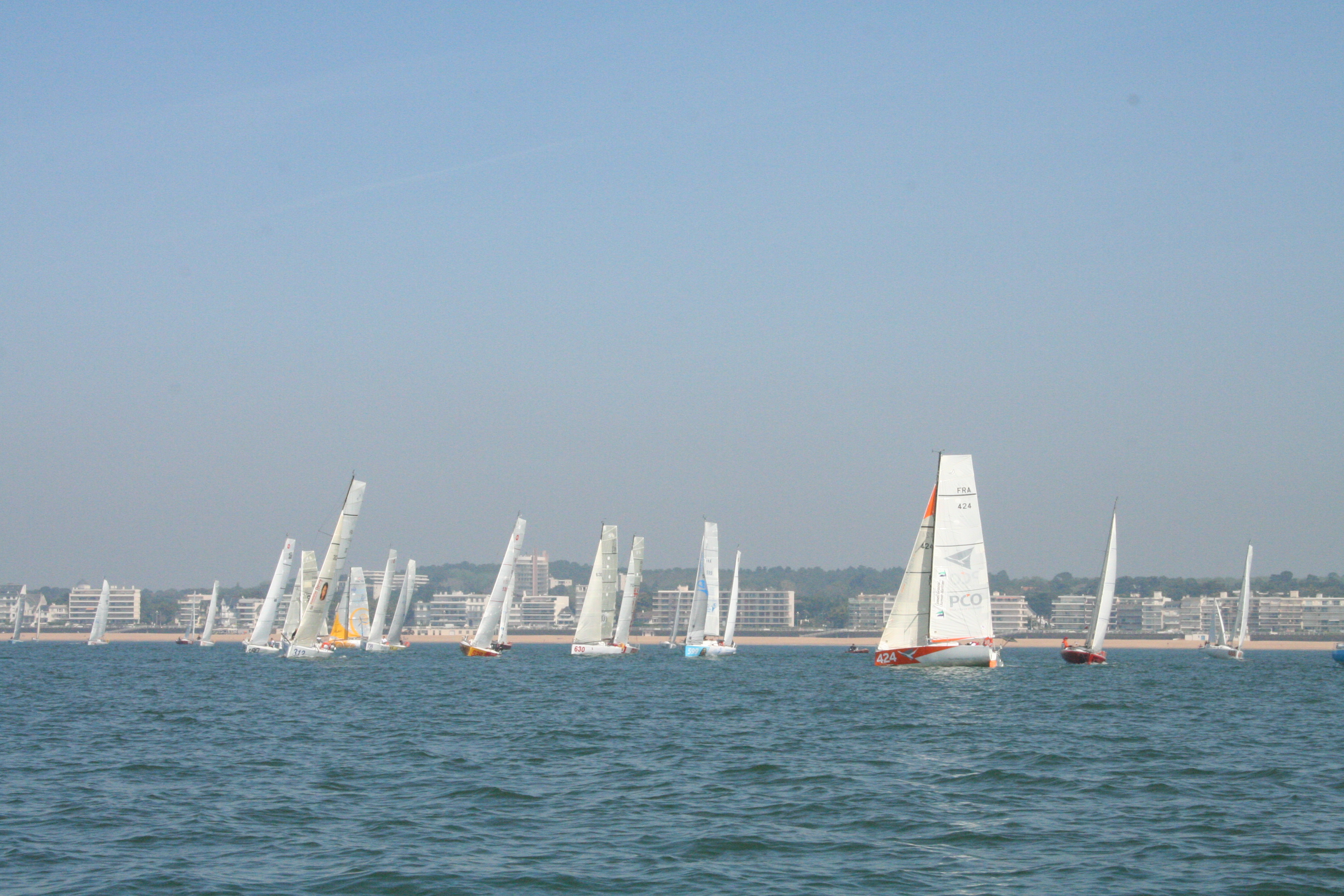 Match-racing, régate au large de Pornichet, dans la baie du Pouliguen. En arrière-plan du cliché : la plage de La Baule.